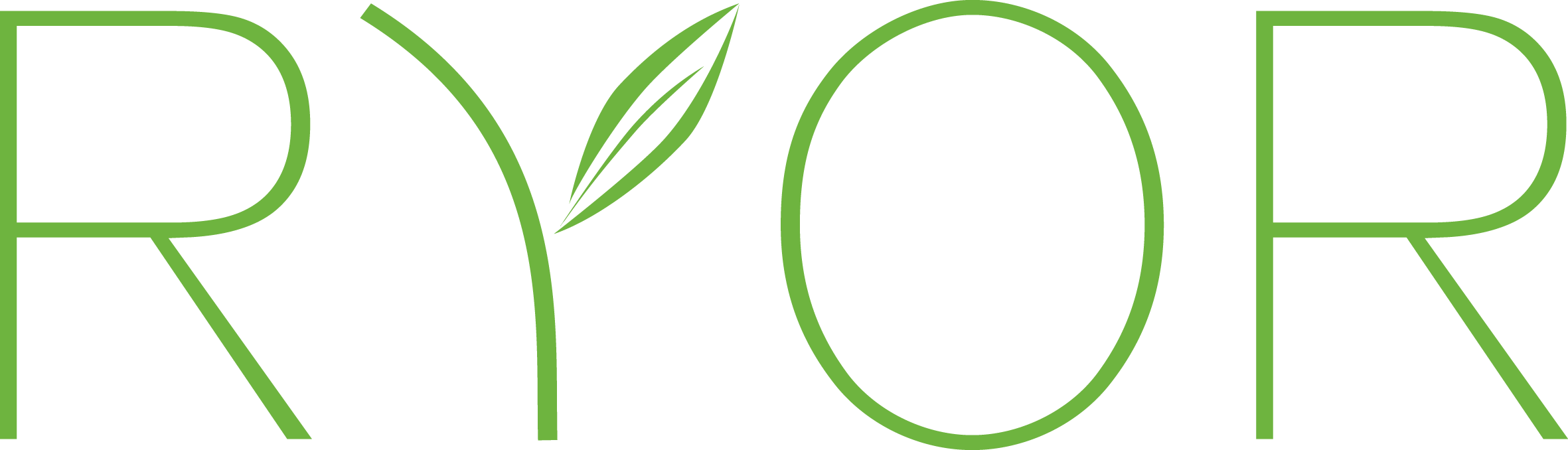 Logo firmy Ryor